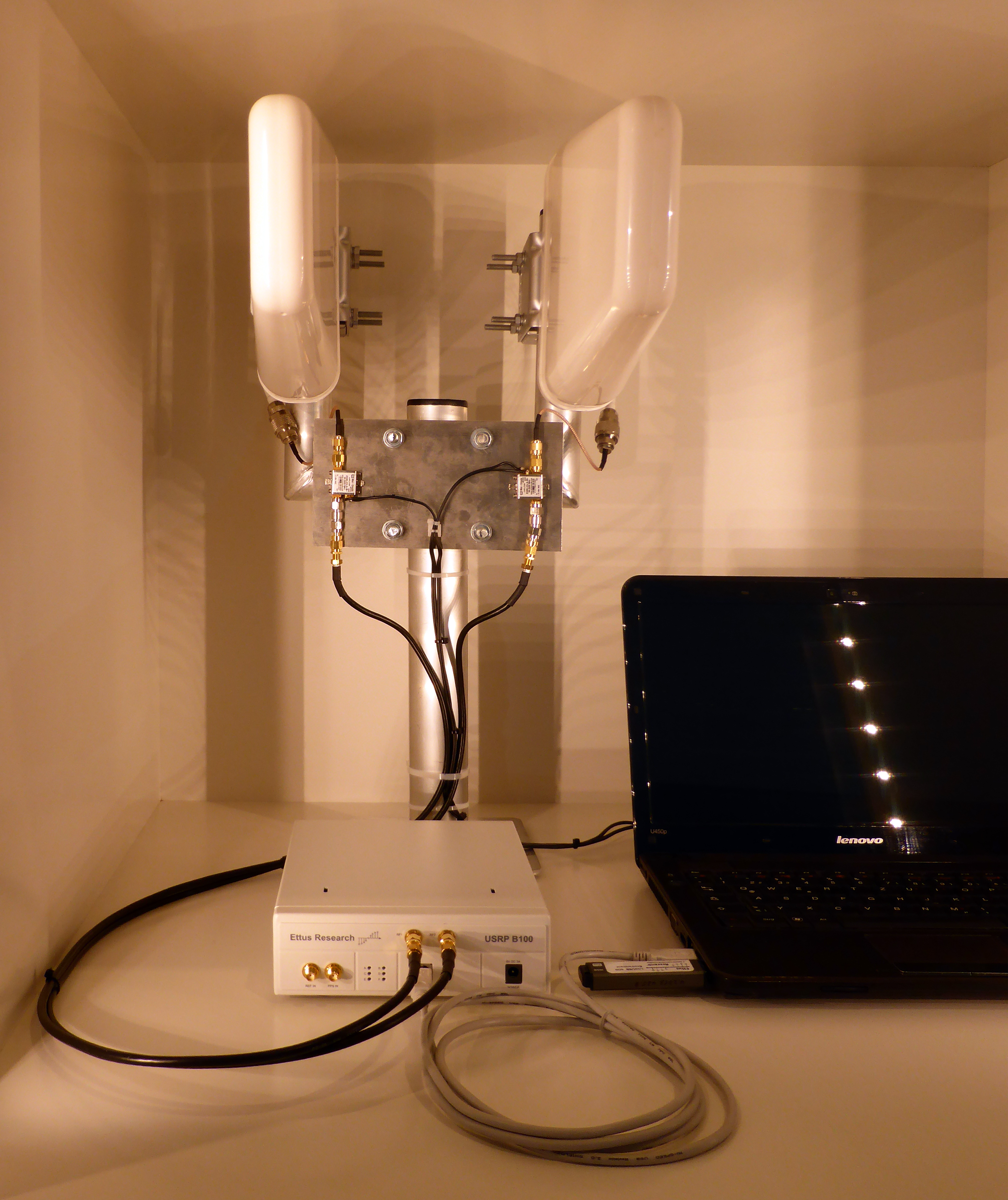 Abhörgerät IMSI-Catcher im Deutschen Technikmuseum in Berlin. Wikipedianische KulTour am 10. Oktober 2015 in der Ausstellung des Museums. (Funktionstüchtiger Eigenbau und Leihgabe des Museum für Kommunikation Frankfurt)